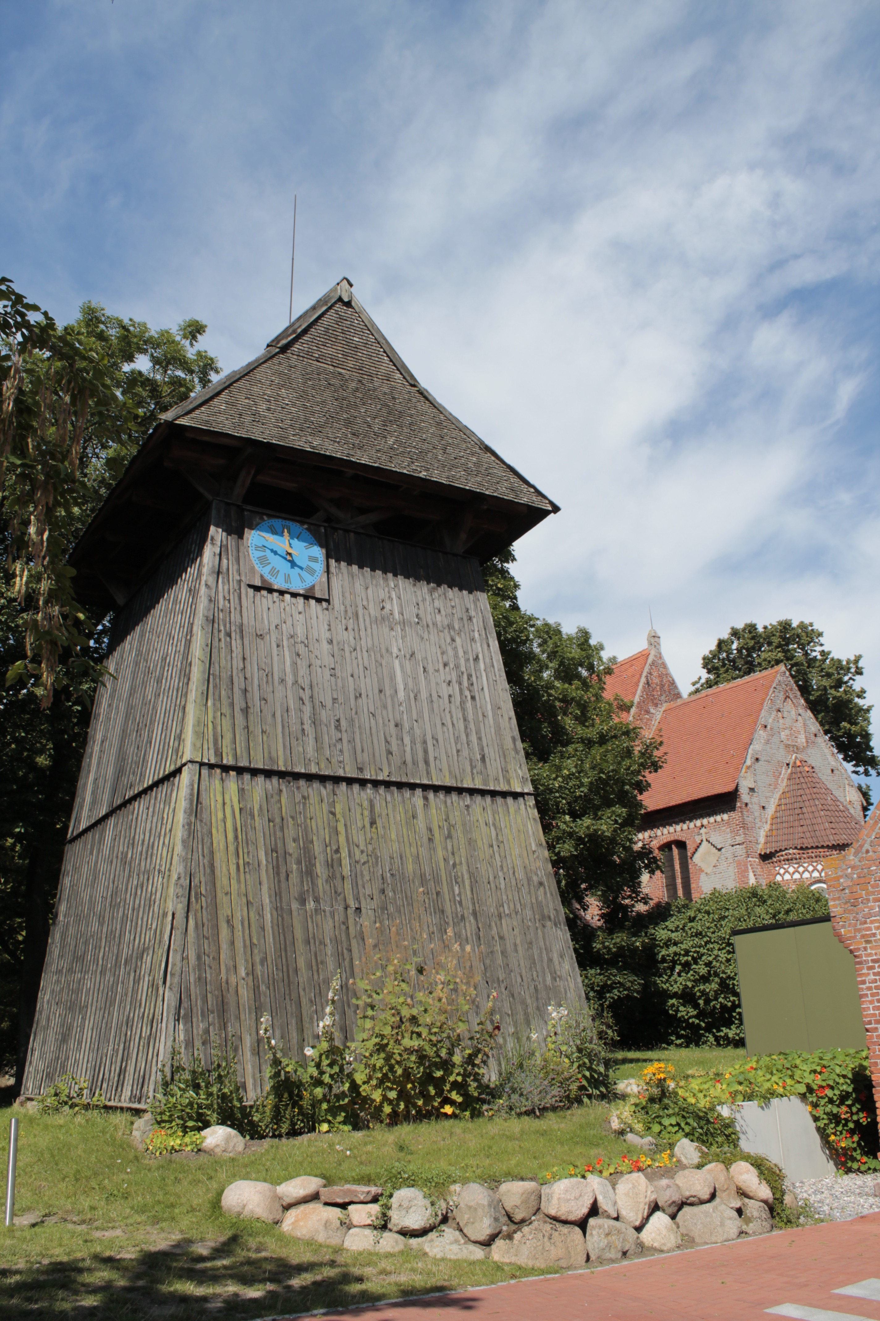 Glockenturm der Pfarrkirche Altenkirchen auf Rügen